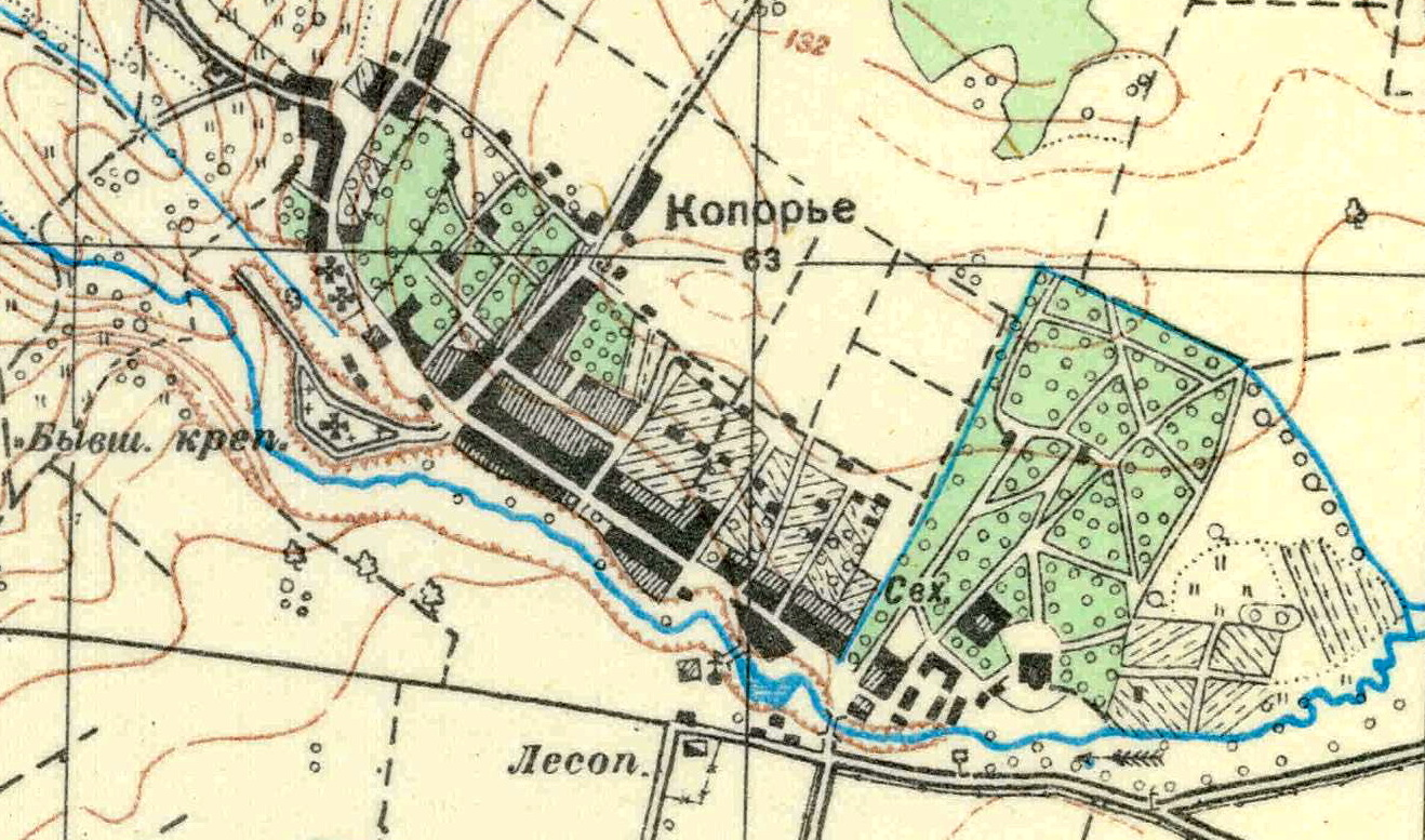 Топографическая карта Ленинградской области, квадрат О-35-11-В-в (Копорье), село Копорье.